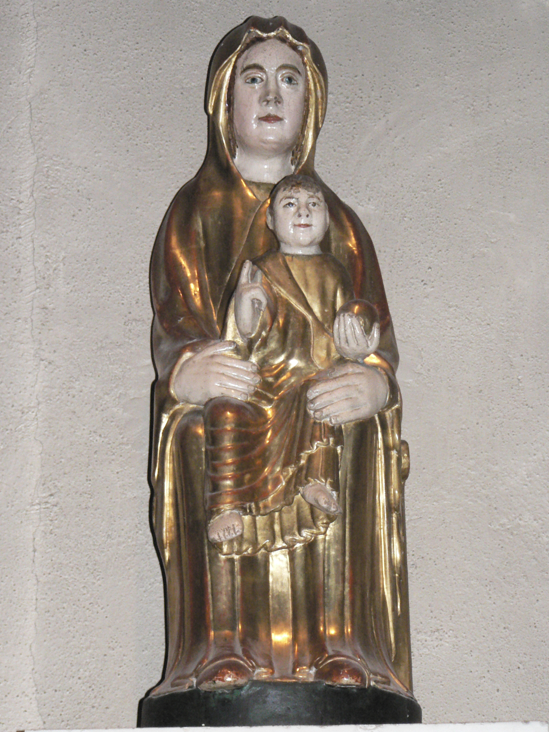 Une des deux statues de la Vierge à l'Enfant du XIIe siècle conservée dans l'église de Marsat (Puy-de-Dôme 63, France).